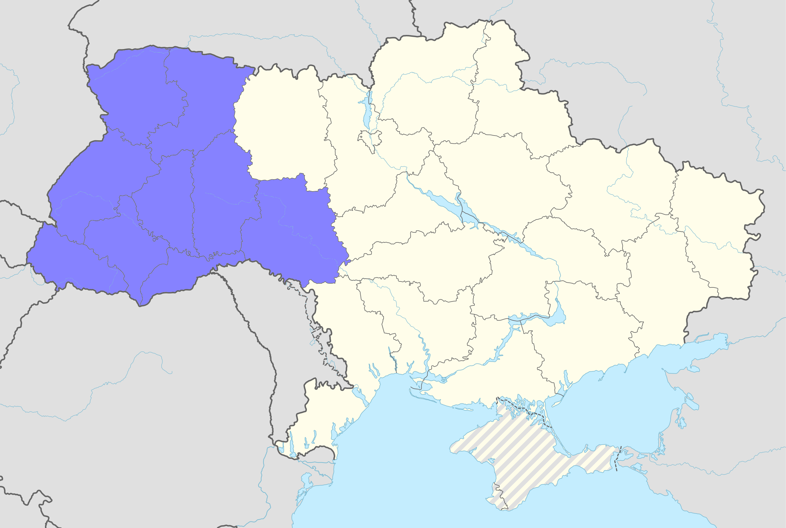 Карта, Національна гвардія України, Західне територіальне управління